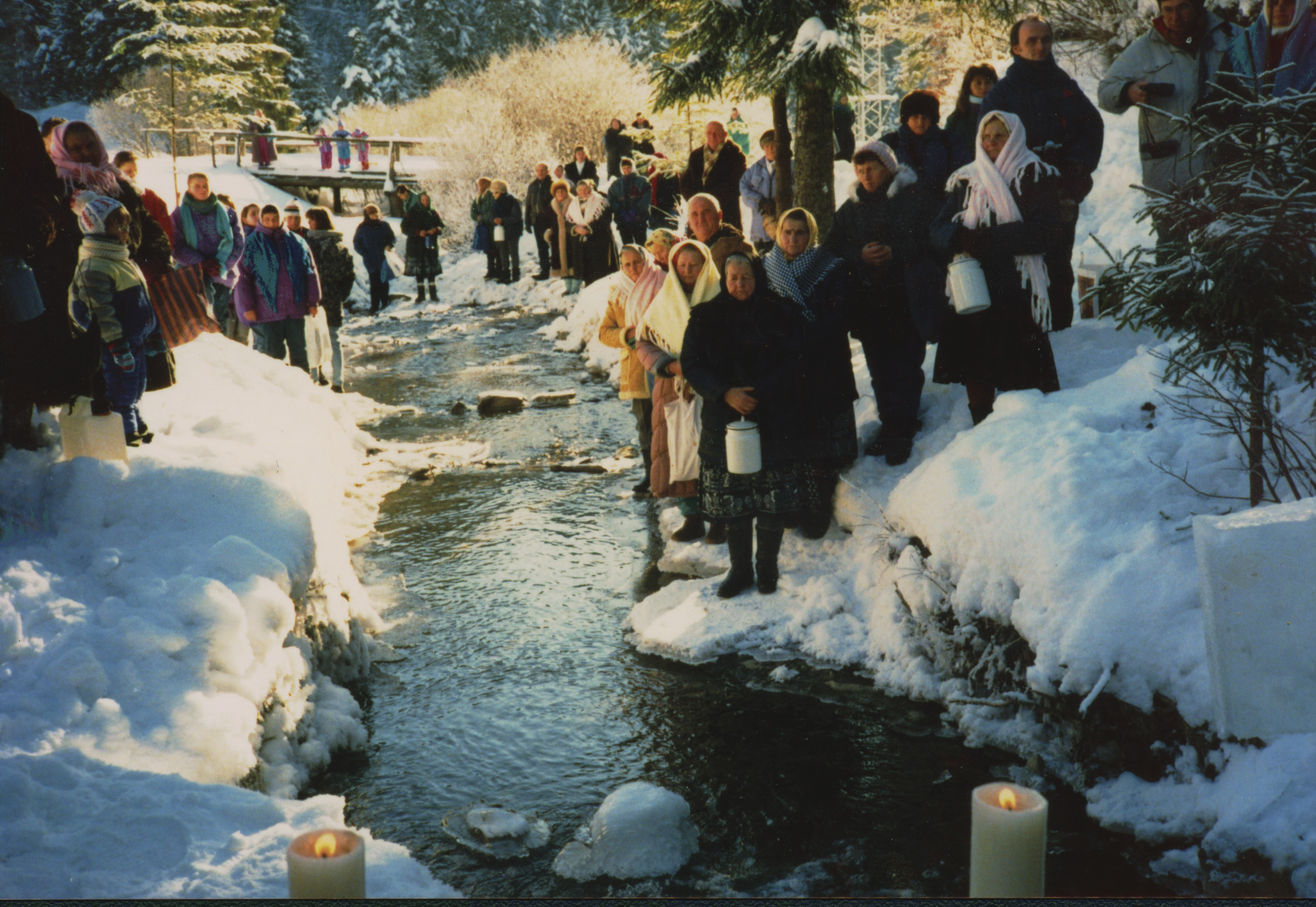 Svätenie vody v potoku na Bohozjavenie u gréckokatolíkov, Litmanová, Slovakia r. 1996